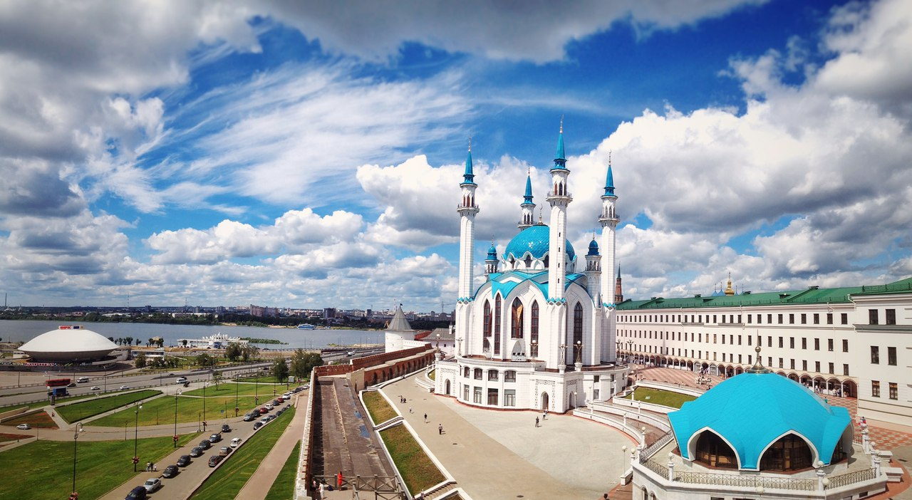 Ансамбль Казанского Кремля (Государственный историко-архитектурный и художественный музей-заповедник "Казанский Кремль"): Кремль, Казань, Татарстан